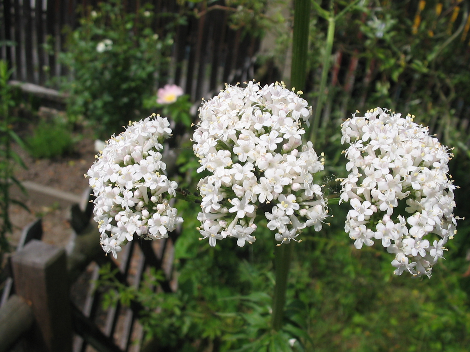 Valeriana officinalis - Blüte